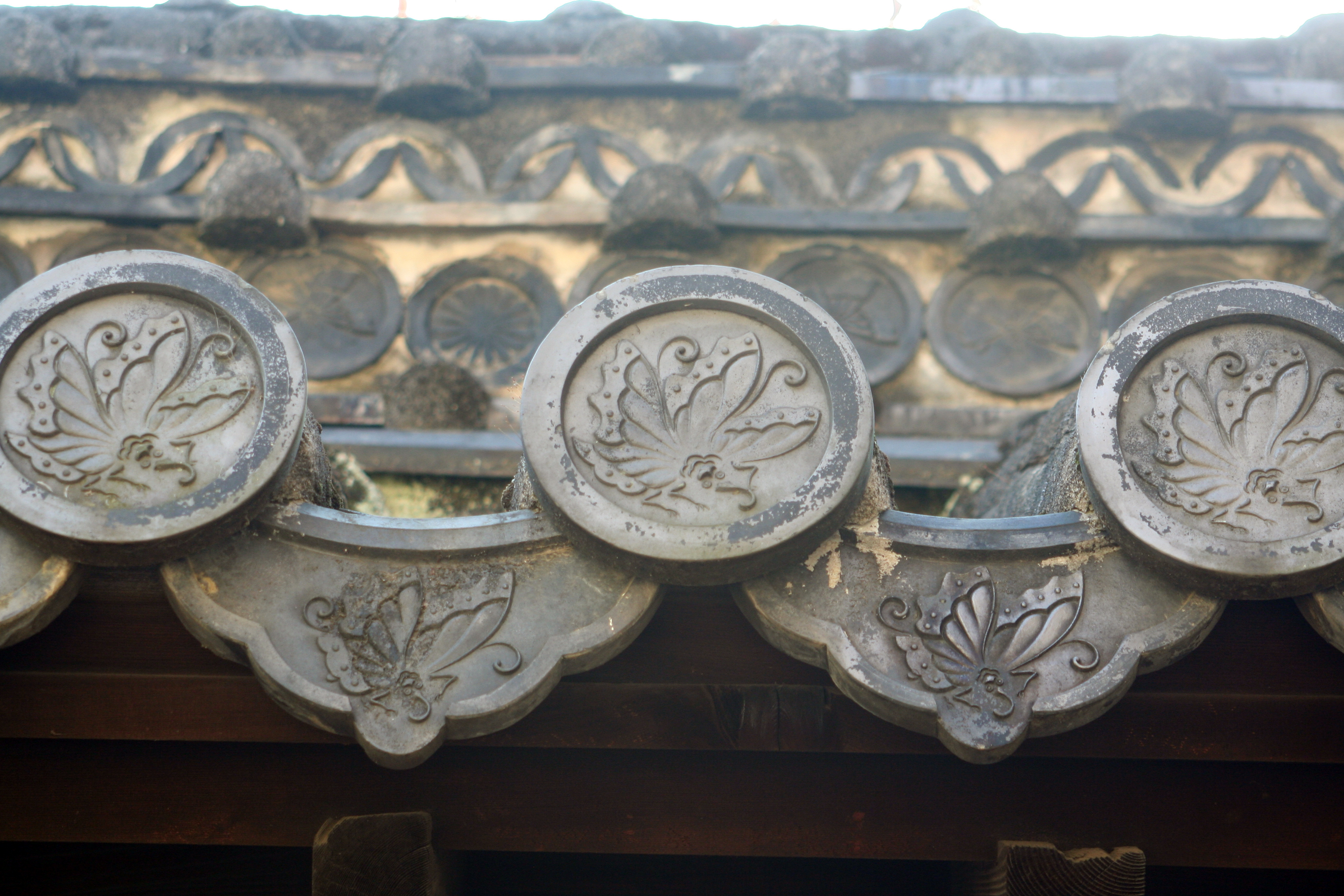 2009年秋の姫路城。 ろの門の屋根瓦。池田家の家紋がある。